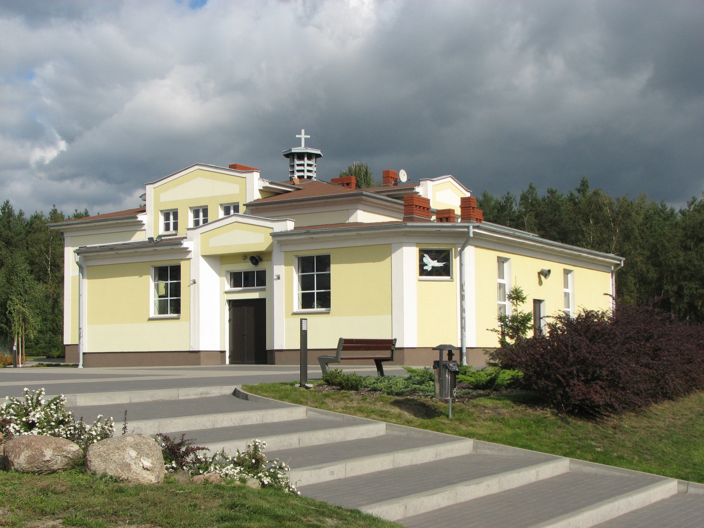 Kaplica parafialna Matki Bożej Fatimskiej w Koziegłowach (powiat poznański), na osiedlu Leśnym.